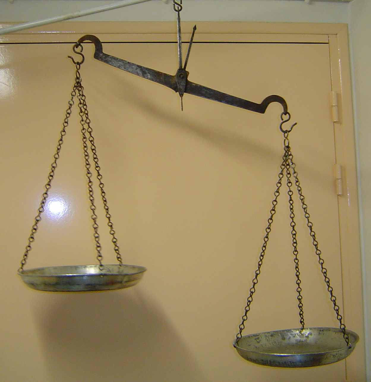 Une balance à fléau